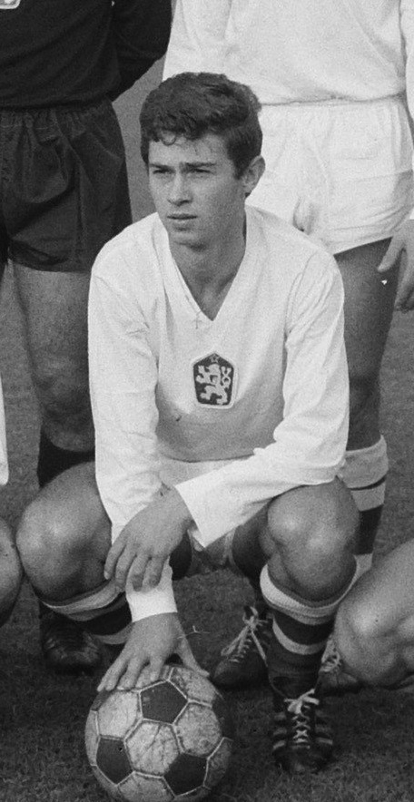 Juraj Szikora v roce 1966